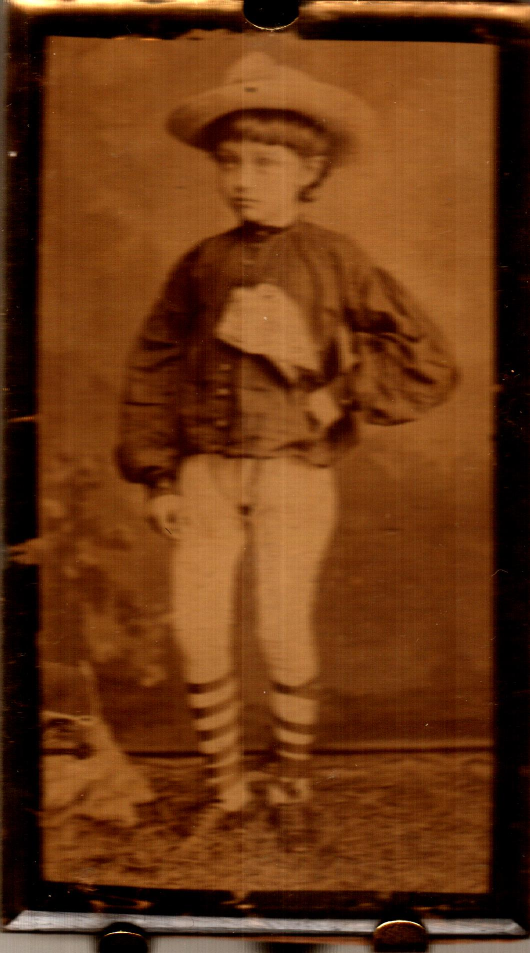 I scanned this photo on the 7th of september, 2012. 3,8 cm x 7,2 cm. Under glass. On the back side (2): 1884. Copper holder. Published - with its back side - under Creative Commons in the Metapolisz DVD line. 2012. szeptember 7 én szkenneltem ezt az ismeretlen fényképész által készített fényképet. Mérete 3,8 cm x 7,2 cm. Hátoldalán: 1884. Megjelent Creative Commons alatt a Metapolisz DVD sorozatban.